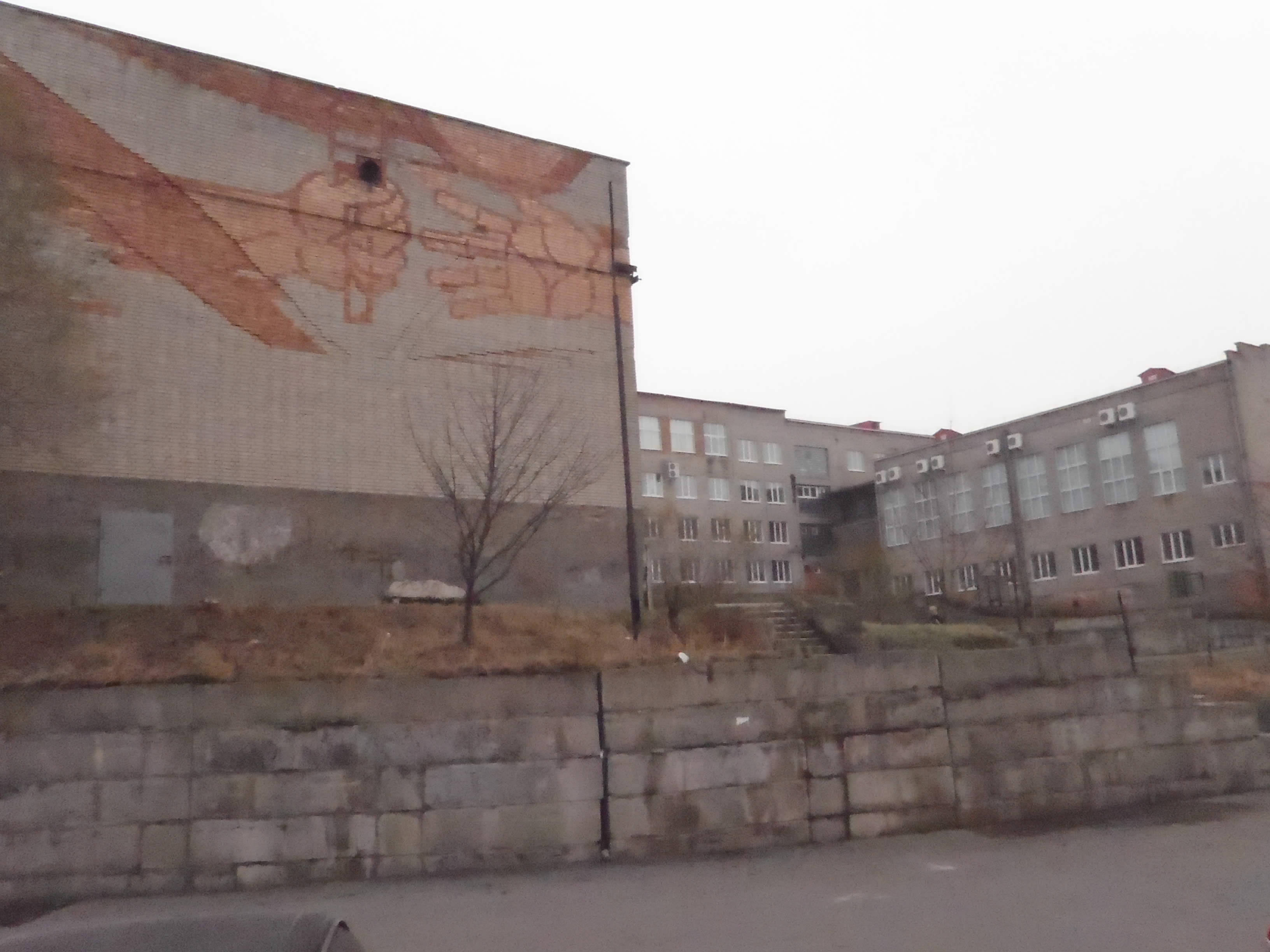 Внешний вид гуманитарного корпуса №3 ВГМУ. На фотографии видна мозаика из кирпича загадочного содержания.